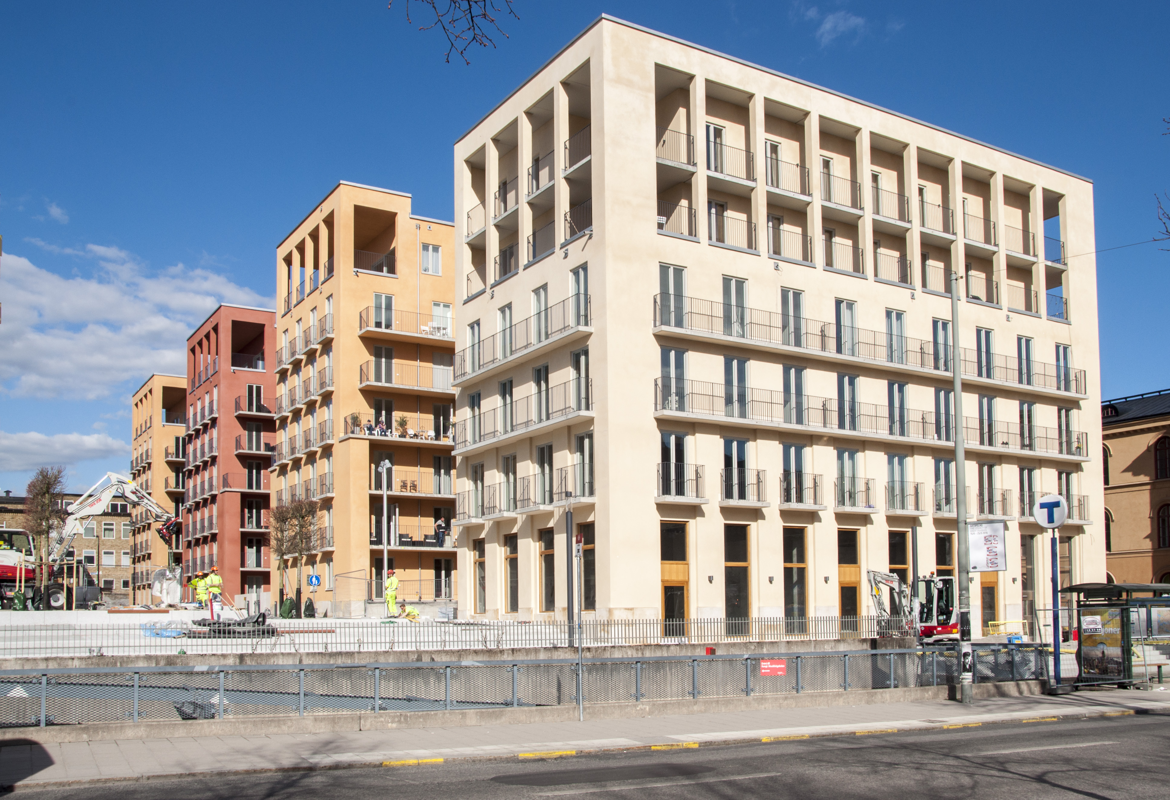 Svea Fanfar, Melodislingan (Valhallavägen/Lidingövägen) Stockholm Byggnadsår 2013-15 Byggherre: Etapp 1: Veidekke Bostad AB, Panorama och CA Fastigheter Arkitekt: Brunnberg & Forshed Ägare: BRF Svea Fanfar